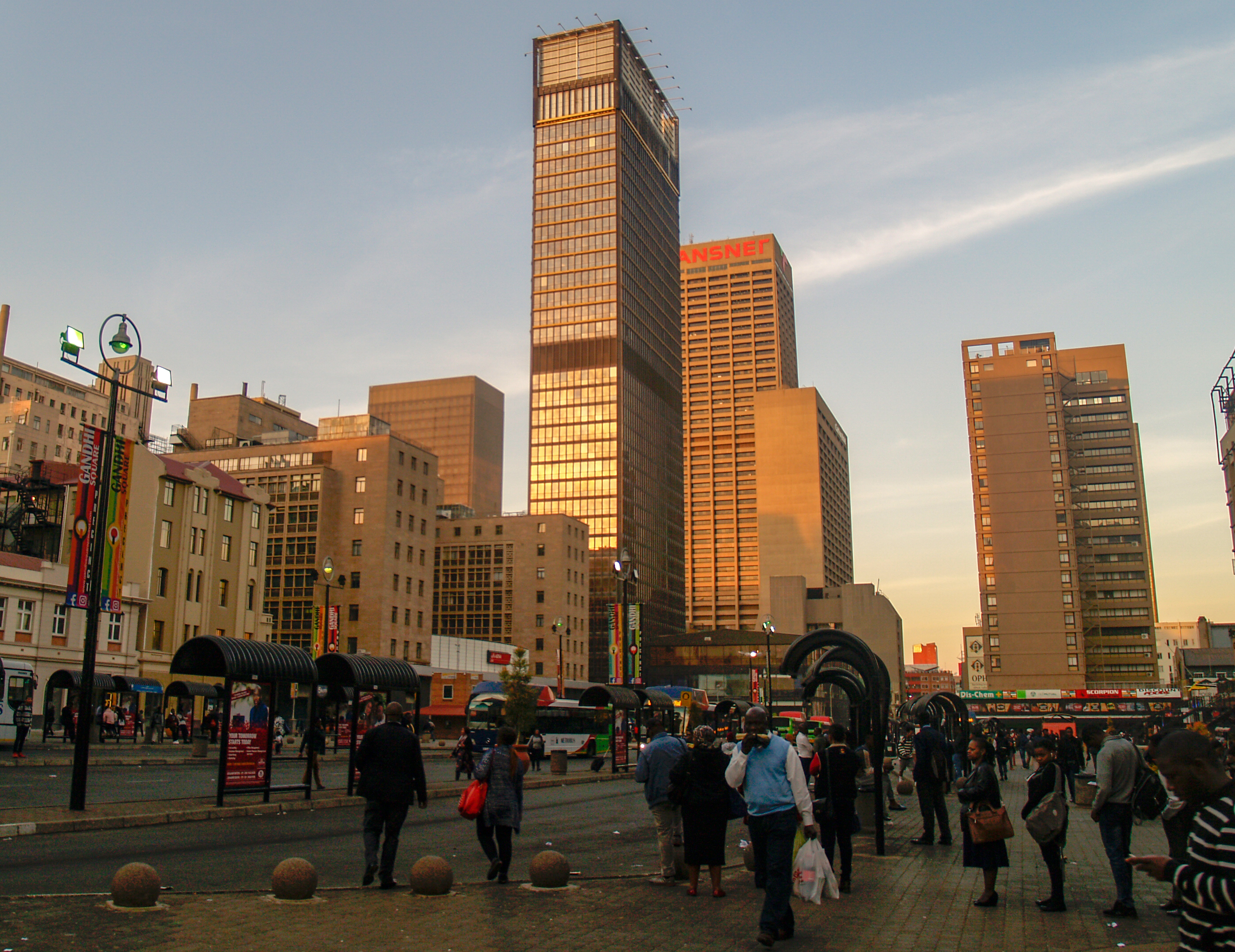 Trust Bank Building